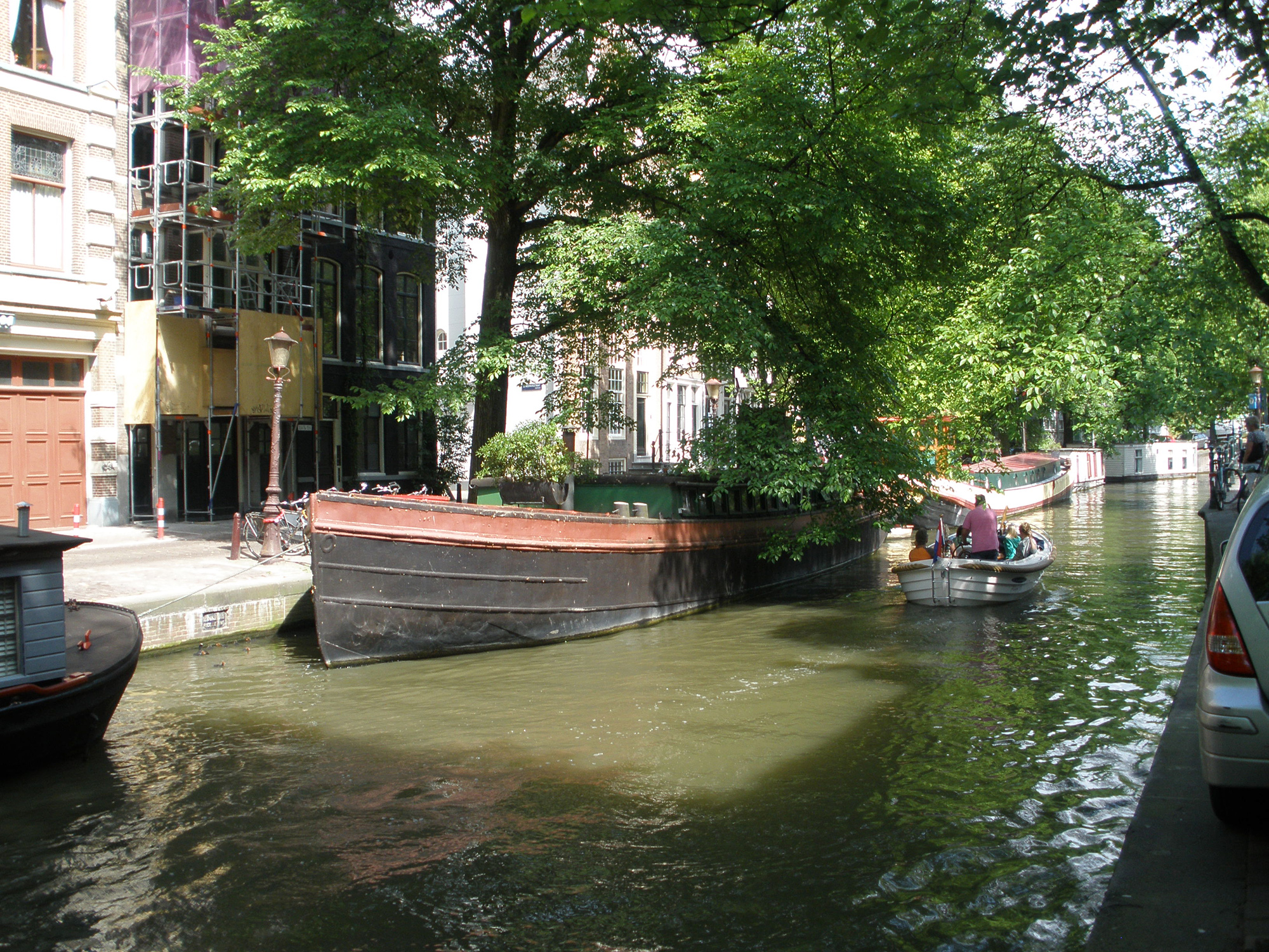 The Raamgracht canal in Amsterdam